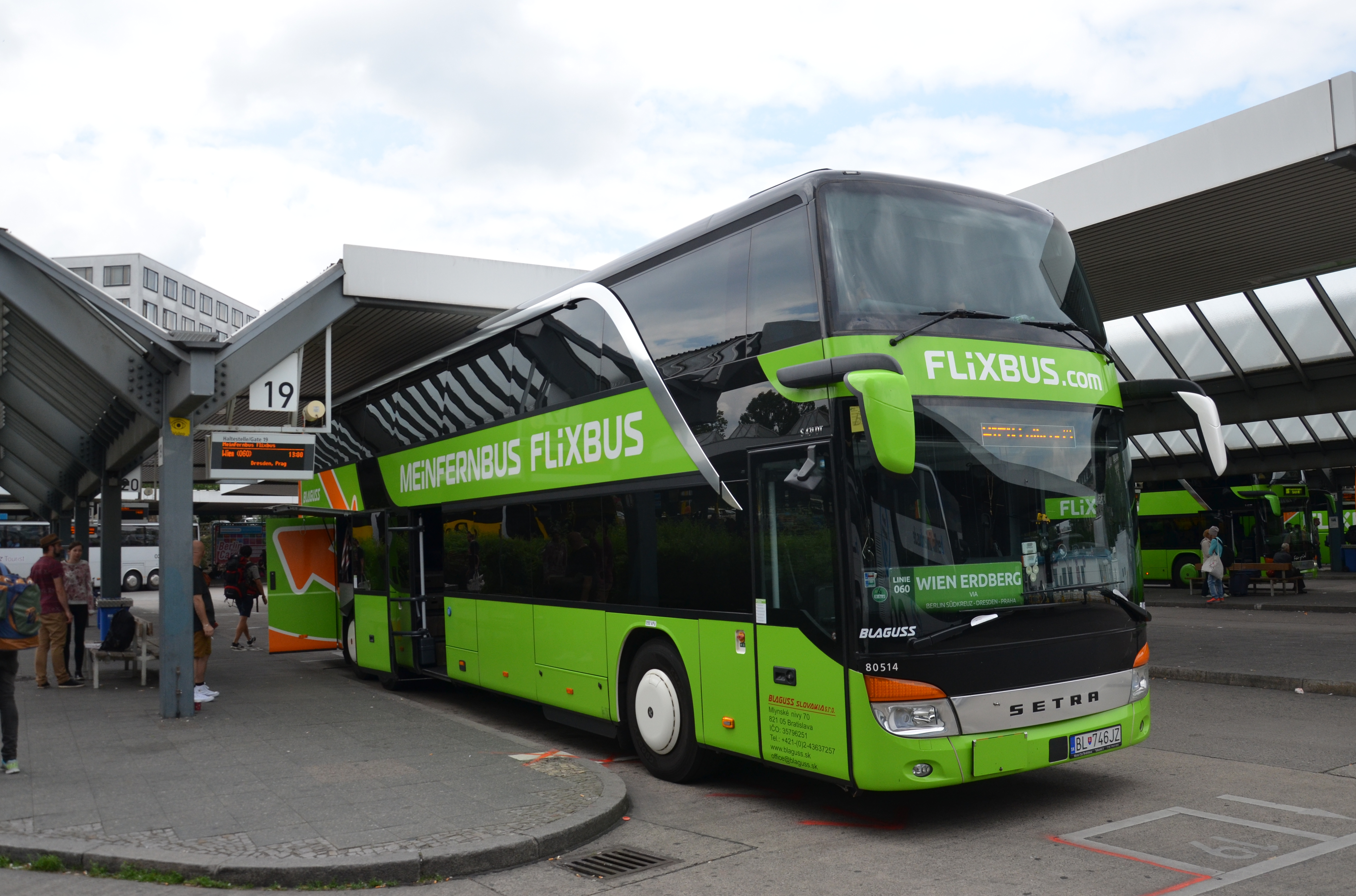 Setra S 431 DT de la compagnie Flixbus, à Berlin Messe (ZOB).